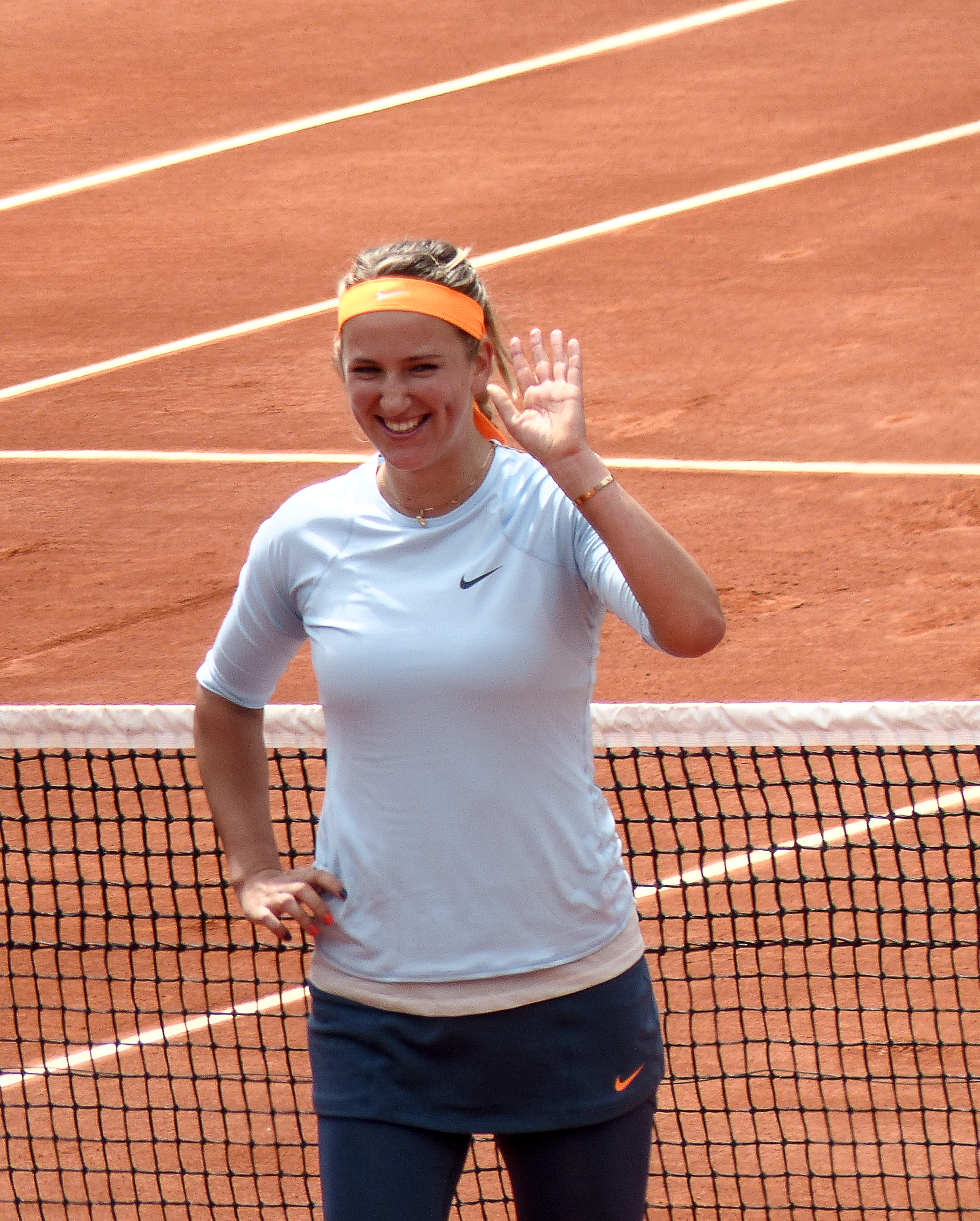 2ème tour Roland Garros 2013 : Victoria Azarenka (BLR) def. Elena Vesnina (RUS)